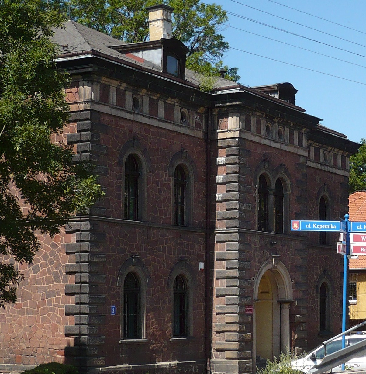 Nowa Ruda, ul. Niepodległości 2 - pierwotnie budynek starostwa powiatowego, następnie siedziba szkoły milicyjnej, sądu, prokuratury, kolegium ds. wykroczeń, komornika, Gminnego Ośrodka Pomocy Społecznej, Rady Gminy Nowa Ruda, obecnie VII Zamiejscowy Wydział Ksiąg Wieczystych i świetlica kuratorska, 1877